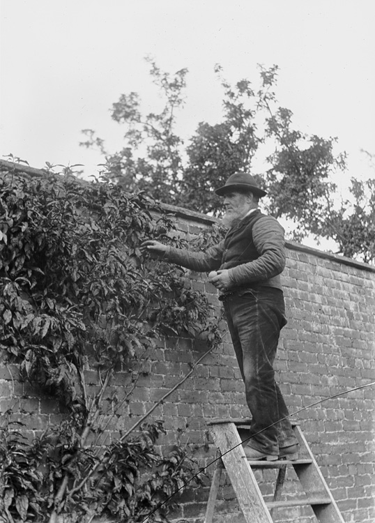 Ffotograffydd/Photographer: P B Abery (1877?-1948) Dyddiad/Date: [191-?] Cyfrwng/Medium: Negydd gwydr / Glass negative Maint/Dimensions: 163 x 119 mm. Cyfeiriad/Reference: PBA77/12 (pba01508) Rhif cofnod / Record no.: 4500243 Rhagor o wybodaeth am gasgliad P B Abery yn Llyfrgell Genedlaethol Cymru More information about the P B Abery Collection at the National Library of Wales